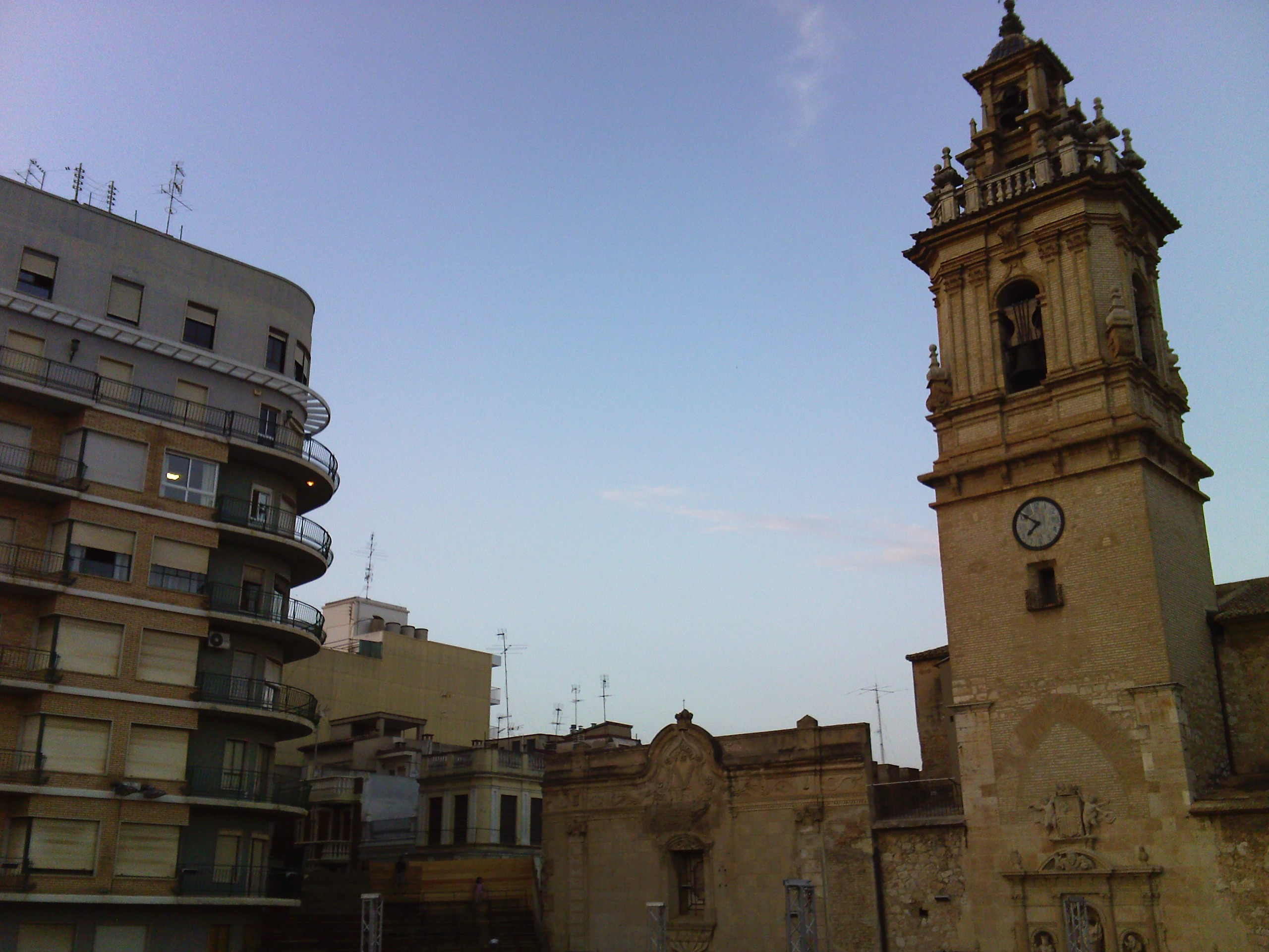 Skyline de la Plaza Mayor de Algemesí.